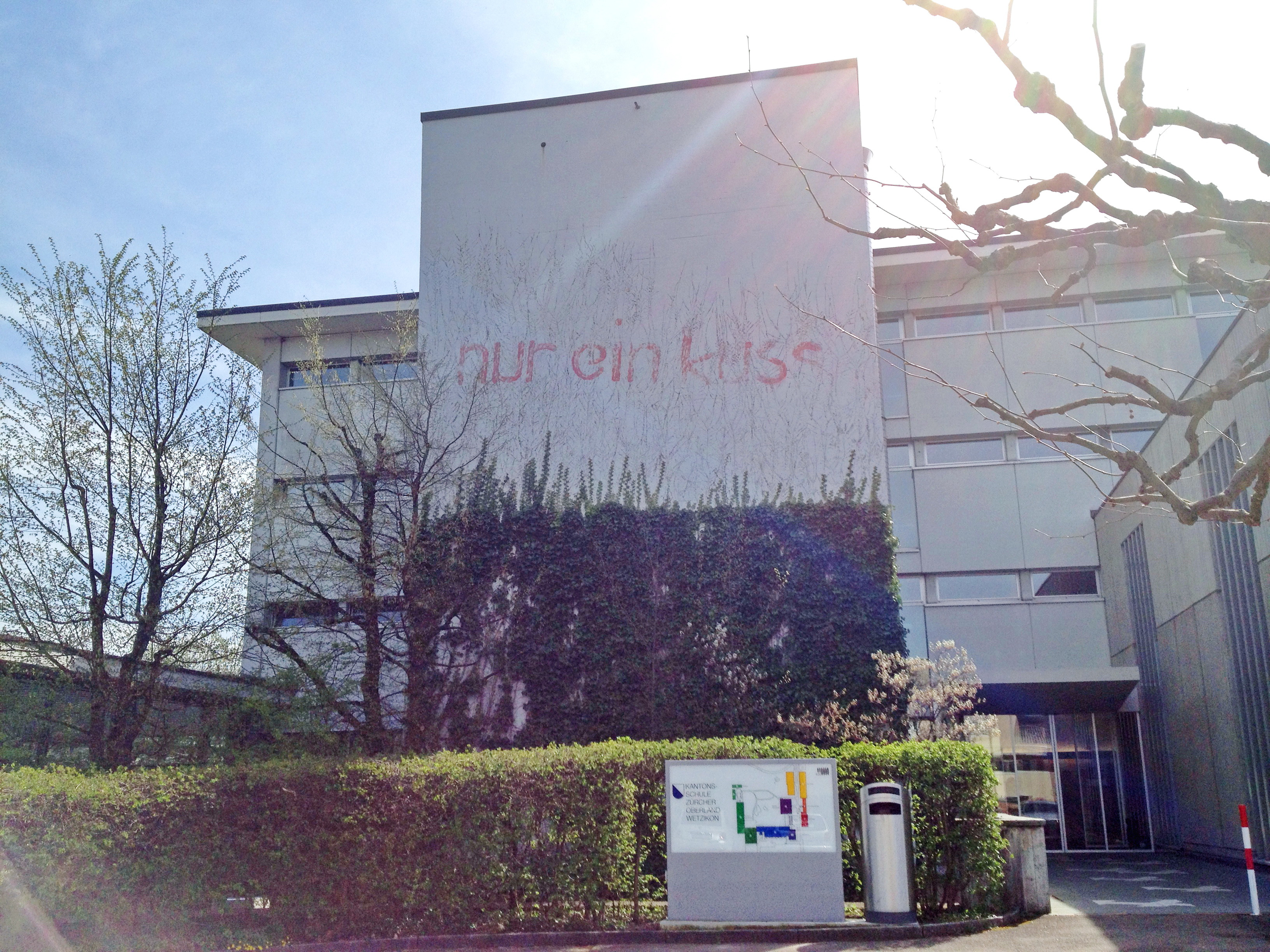 Graffiti an der Kantonsschule Zürcher Oberland